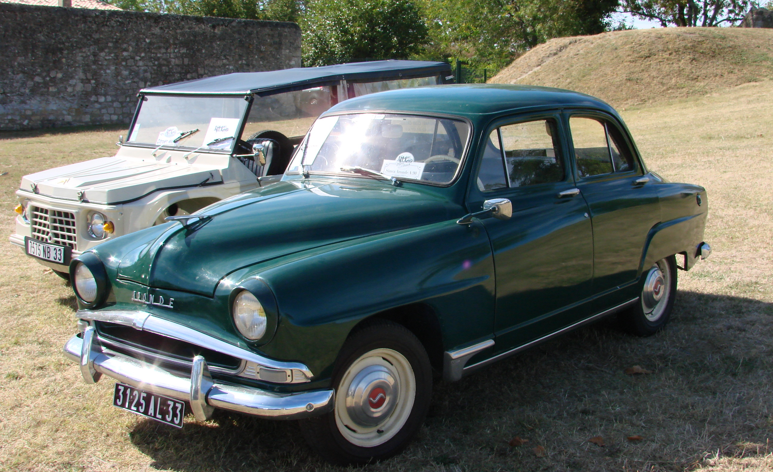 Simca Aronde en 2012 à Blaye